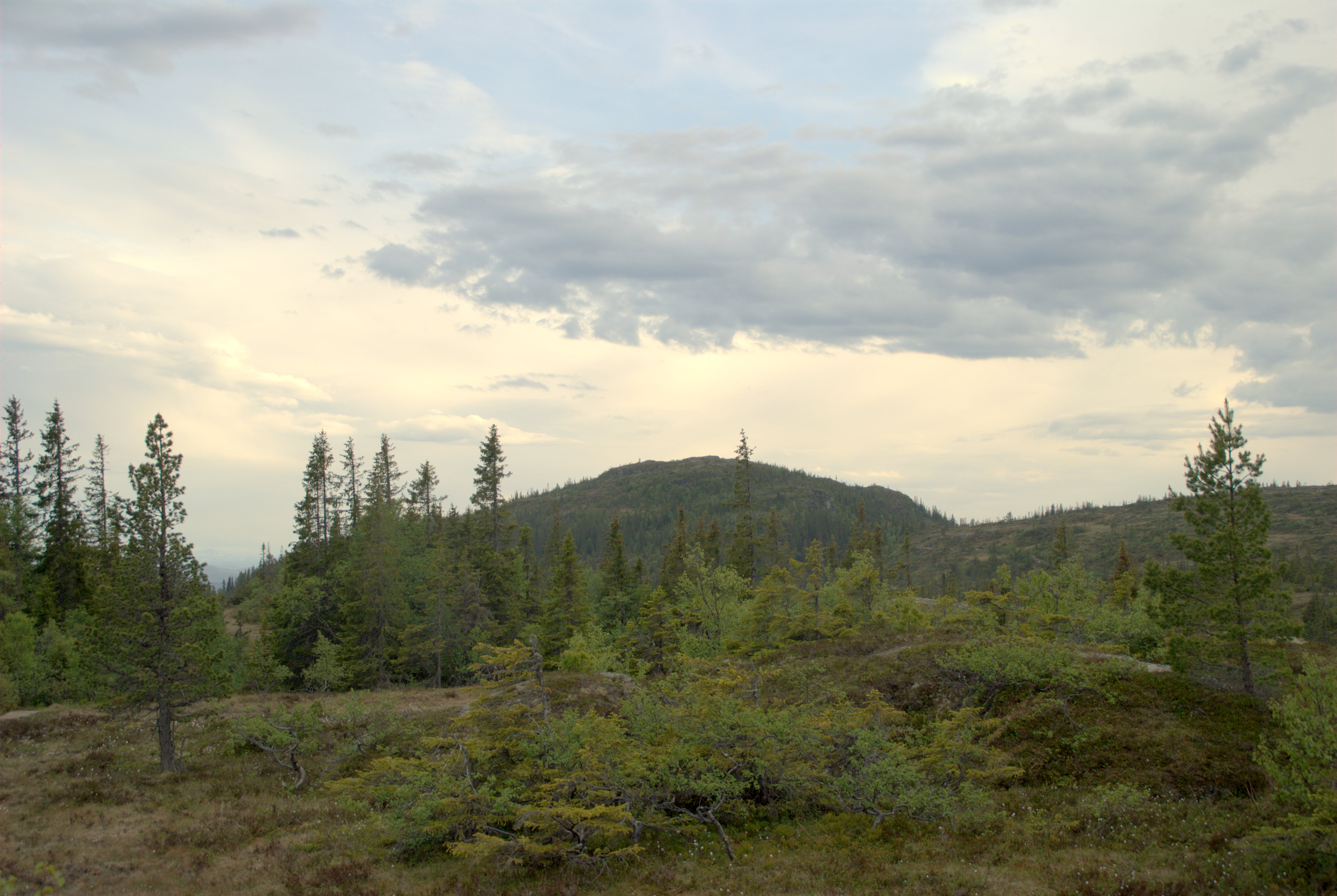 Storheia i Bymarka i Trondheim.